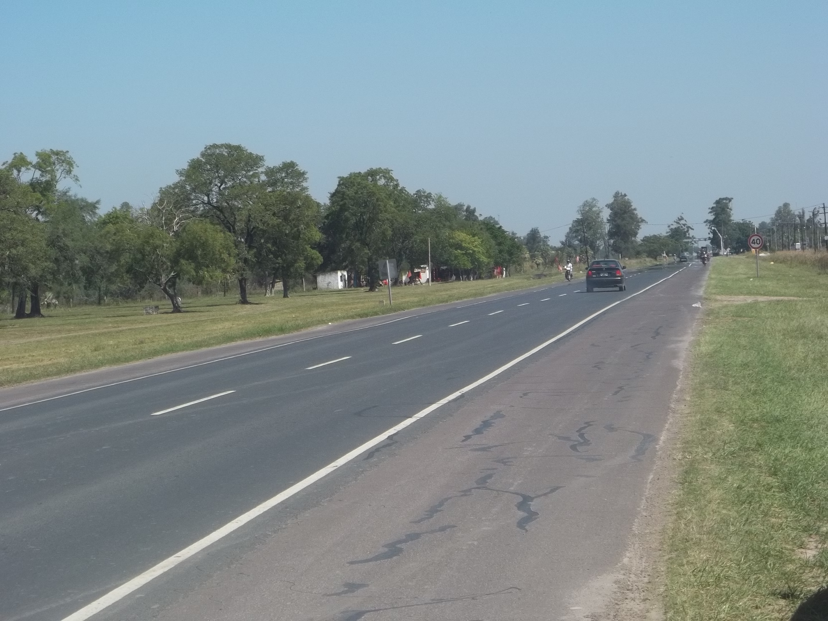 National Route 11 seen from Our Lady Mary oratory to the North, in Villa del Carmen, Formosa, Argentina.